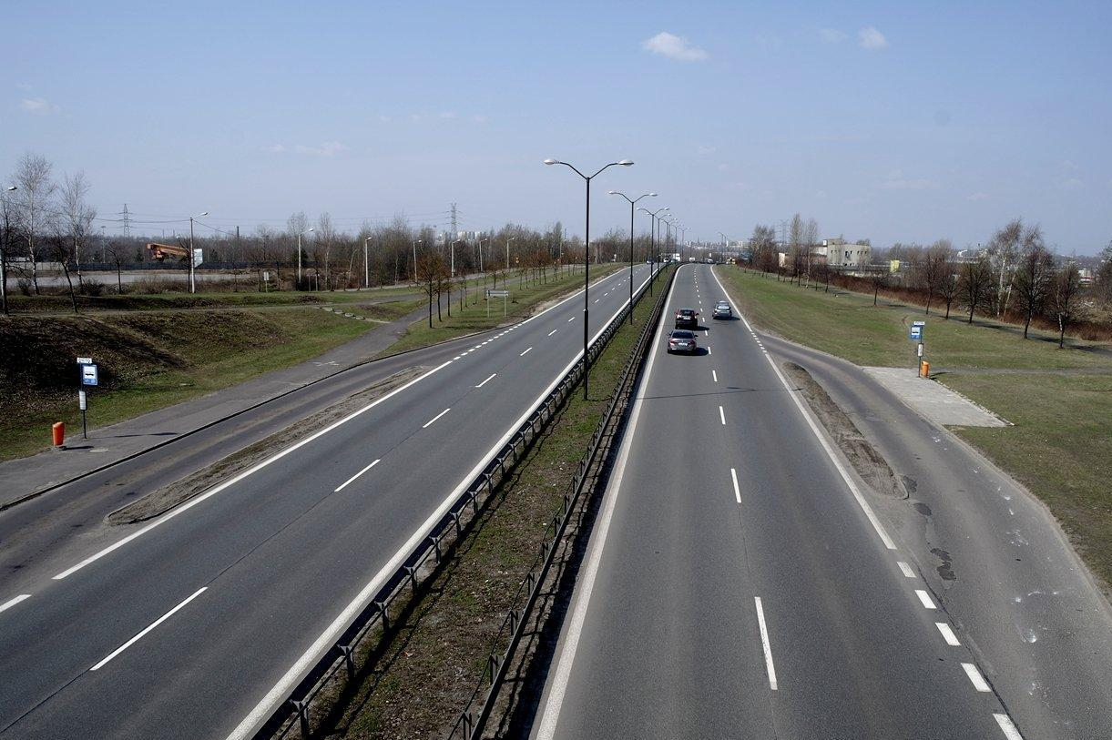 Ulica Bagienna w Katowicach widok na Zachód